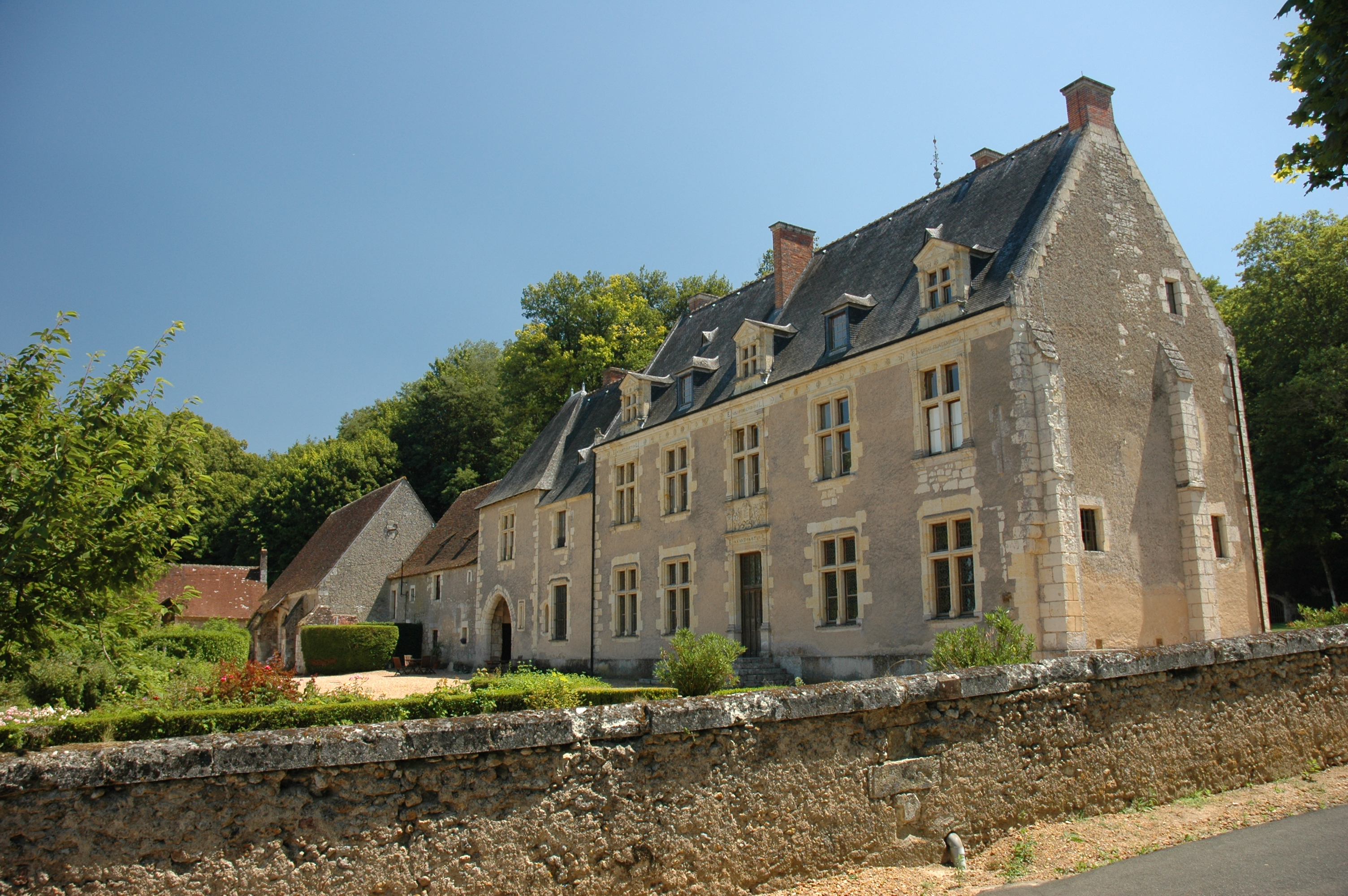 France Loir-et-Cher Manoir La Poissonière (lieu de naissance de Pierre de Ronsard) Photographie prise par GIRAUD Patrick